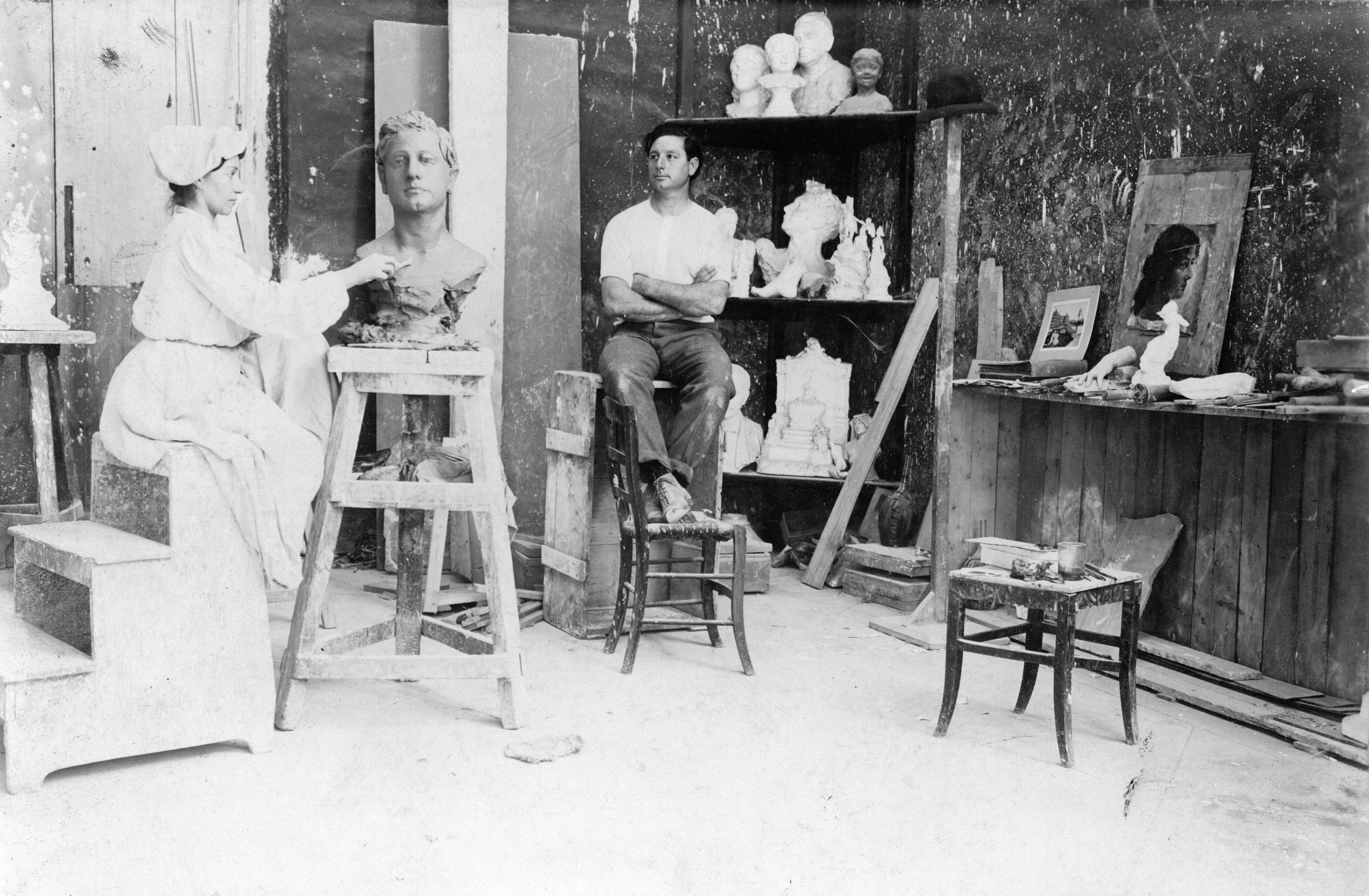 1. La escultora Lola Mora trabajando en su taller con un modelo, . Documento fotográfico 52606.